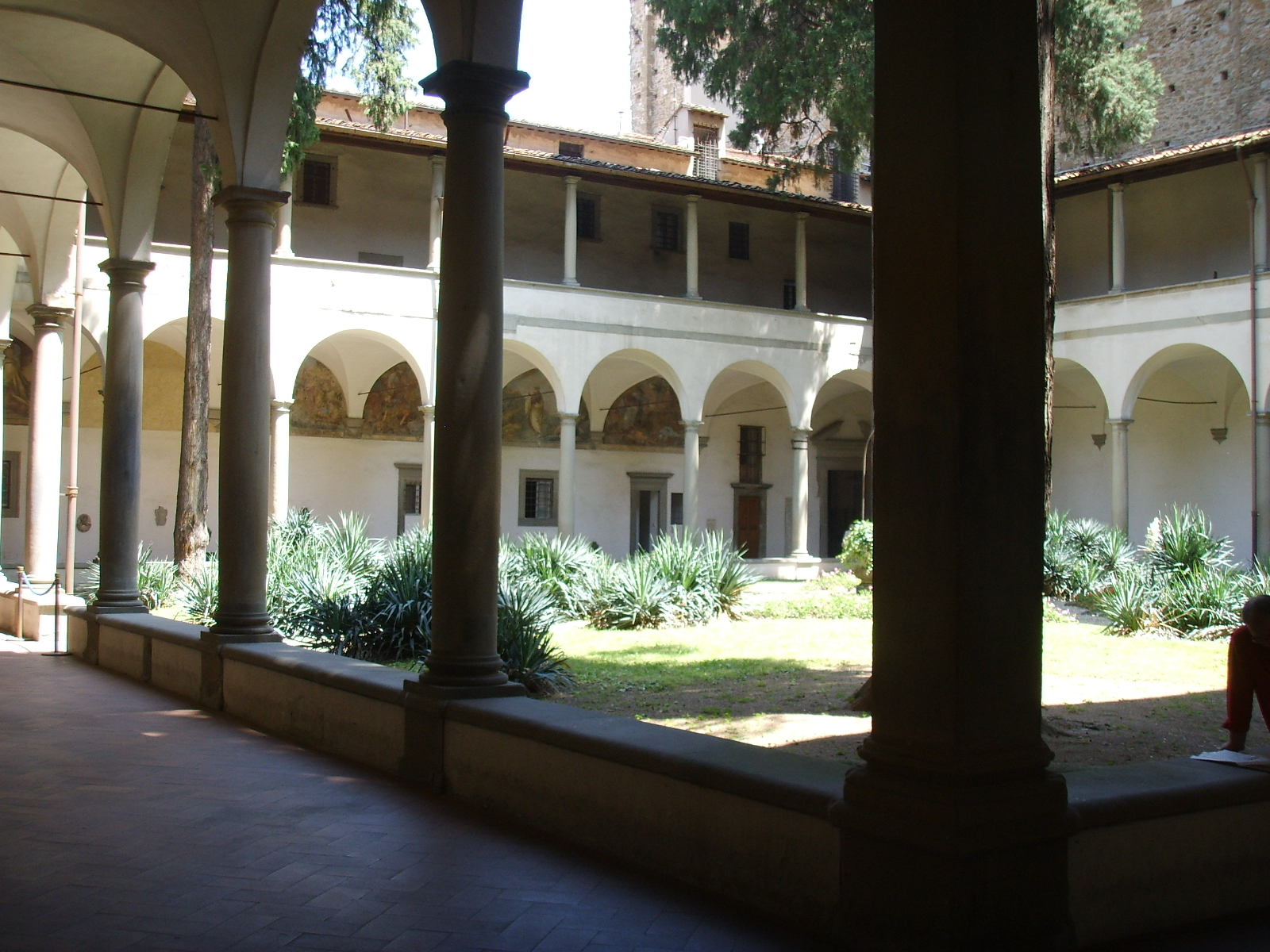 Santa Maria del Carmine church, cloister in Florence, Italy